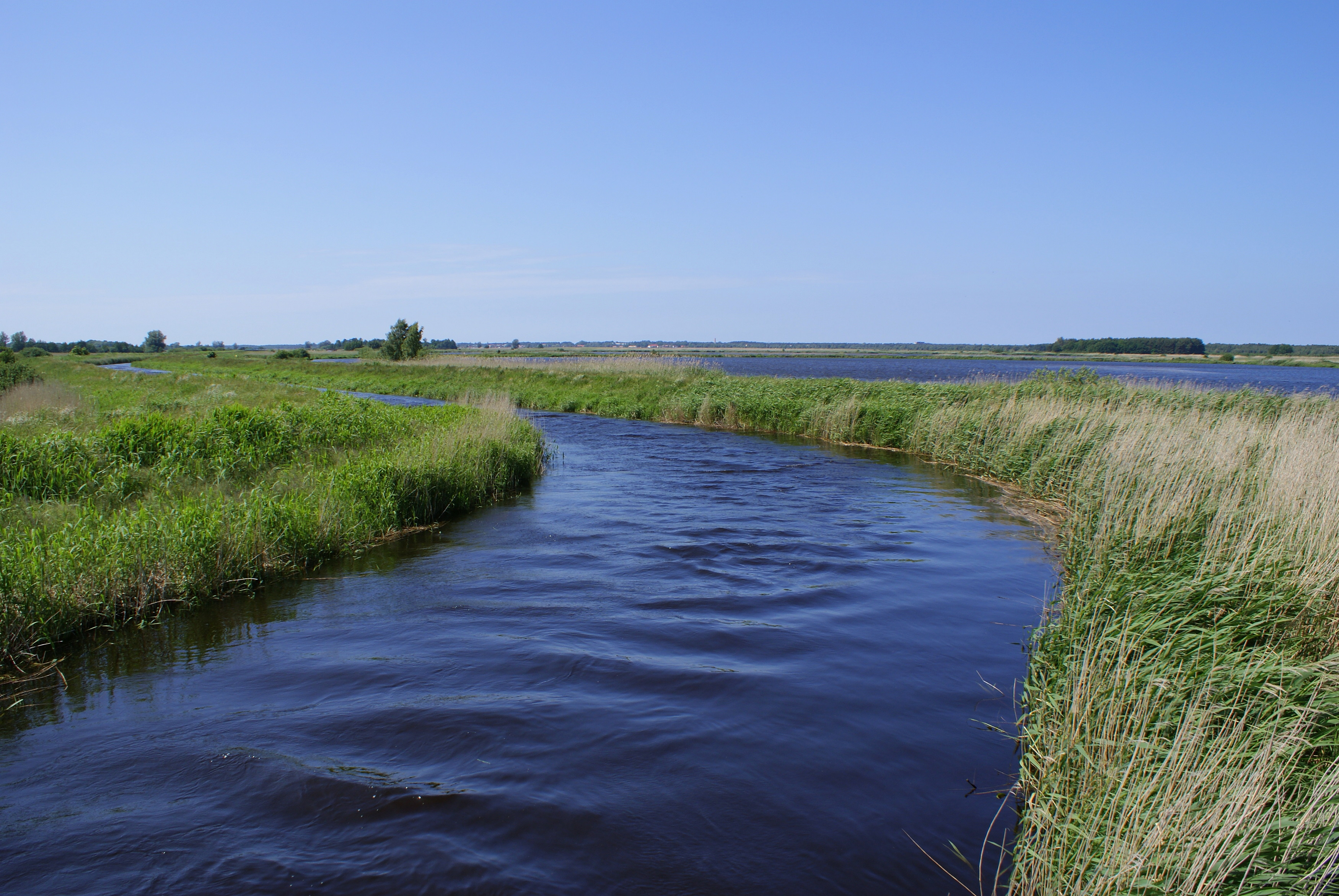 Błotnica z mostu kolejowego na wschód od Głowaczewa/ po wschodniej stronie stawy rybne